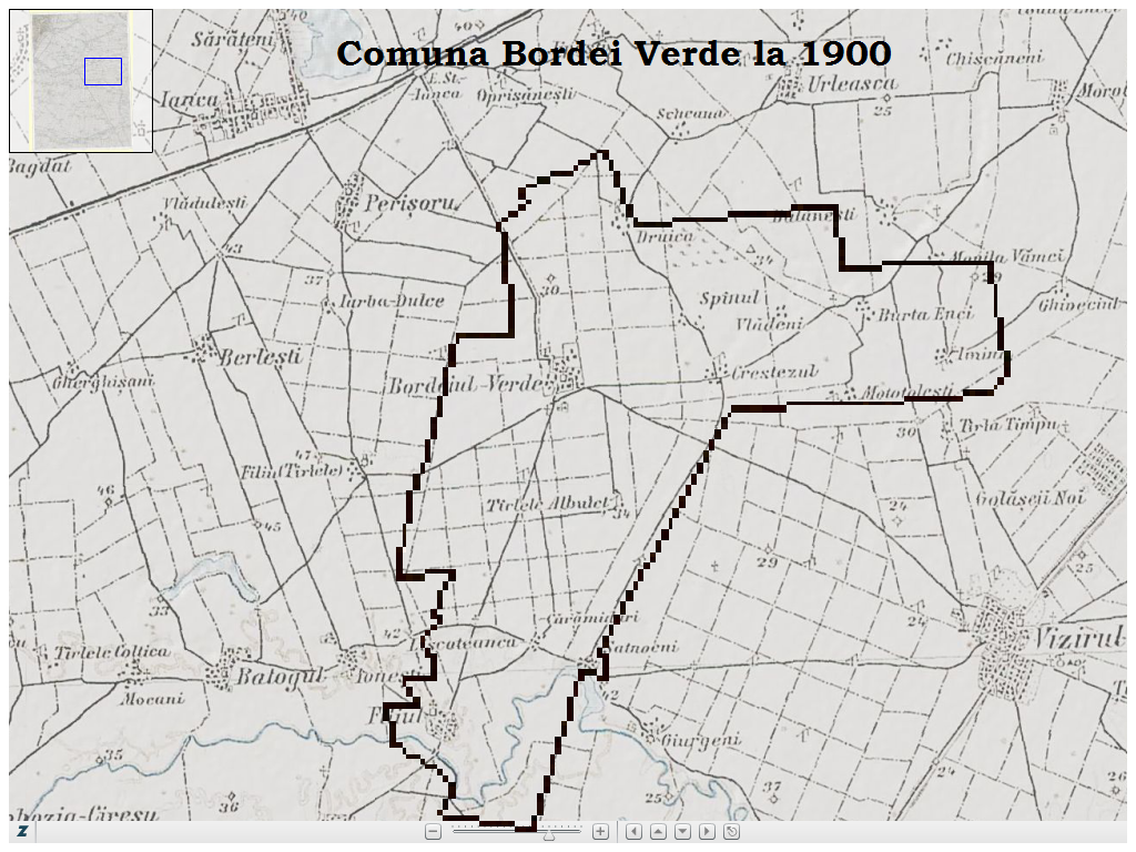 Harta comunei Bordei Verde la anul 1900 Observații: pentru realizarea fișierului am folosit o reproducere parțială (mai puțin de 5% din fișierul original) din foaia de hartă 45-45 din Harta austriacă din 1910 (mai veche de 100 de ani) și aflată în domeniul public, fără restricții privind drepturile de autor.